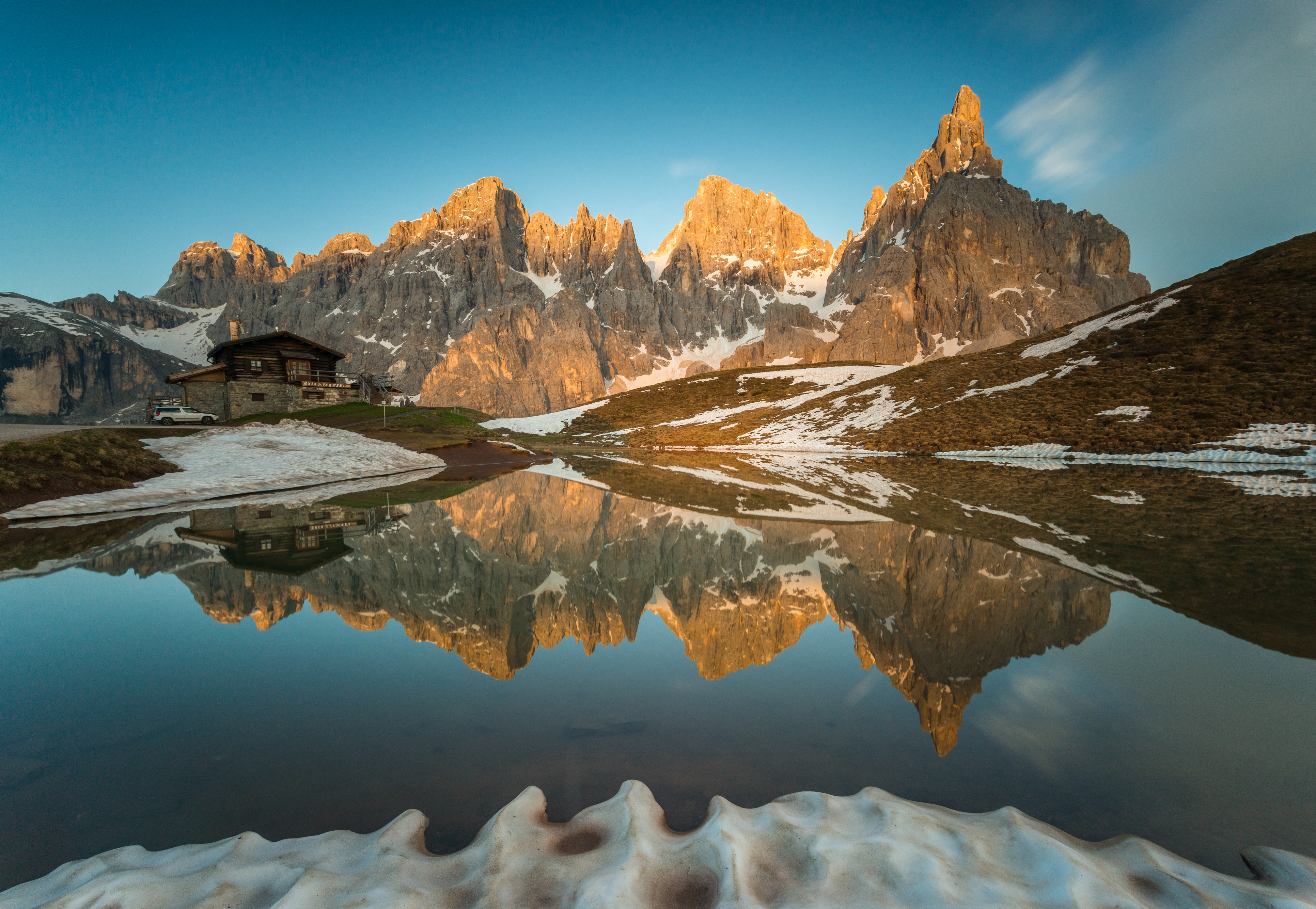 Parco naturale Paneveggio - Pale di San Martino (Q267909)